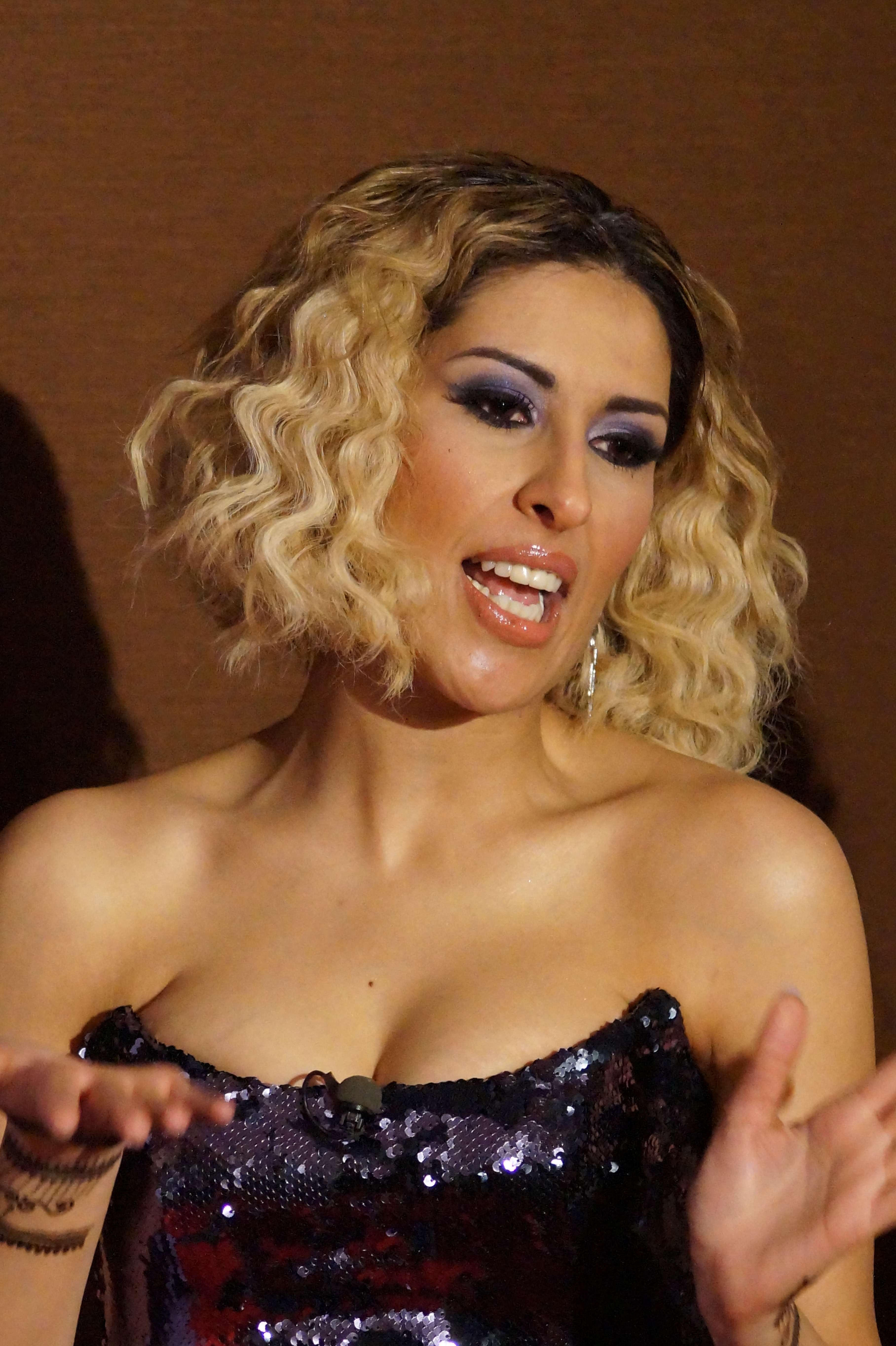 "Gloria – Deutscher Kosmetikpreis" am 27. März 2015 im Hilton Hotel Düsseldorf.